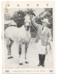 Trujillo Inaugurando El Sector Mejoramiento Social